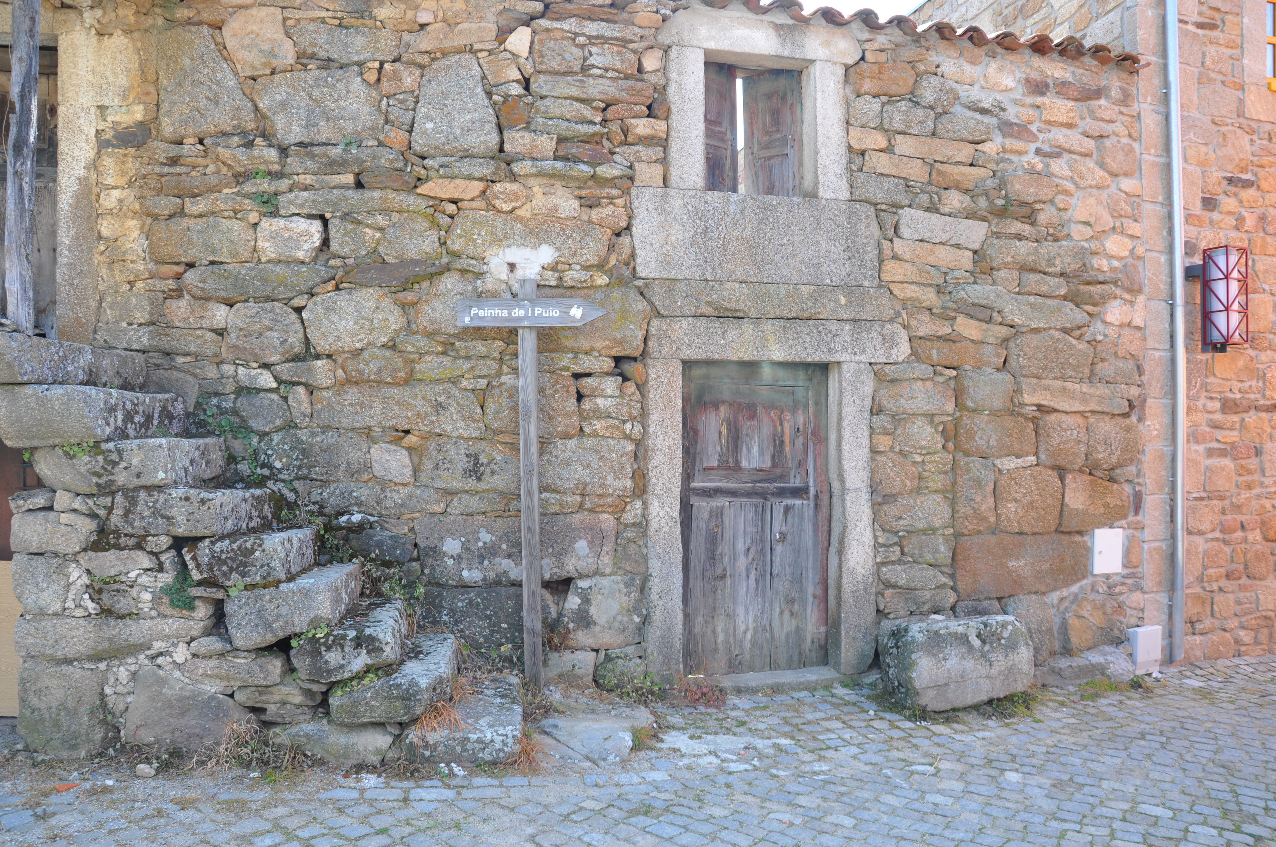 Arquitectura vernácula. Picote, Portugal.